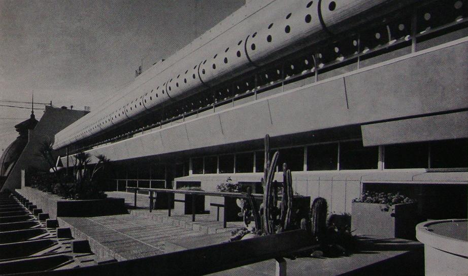 Vista de la terraza del edificio del Banco de Londres y América del Sur en la ciudad de Buenos Aires (hoy Banco Hipotecario). A la derecha, el parasol perforado que proteje al ventanal del comedor de empleados. Arquitectos: Estudio SEPRA y Clorindo Testa (Asoc.)